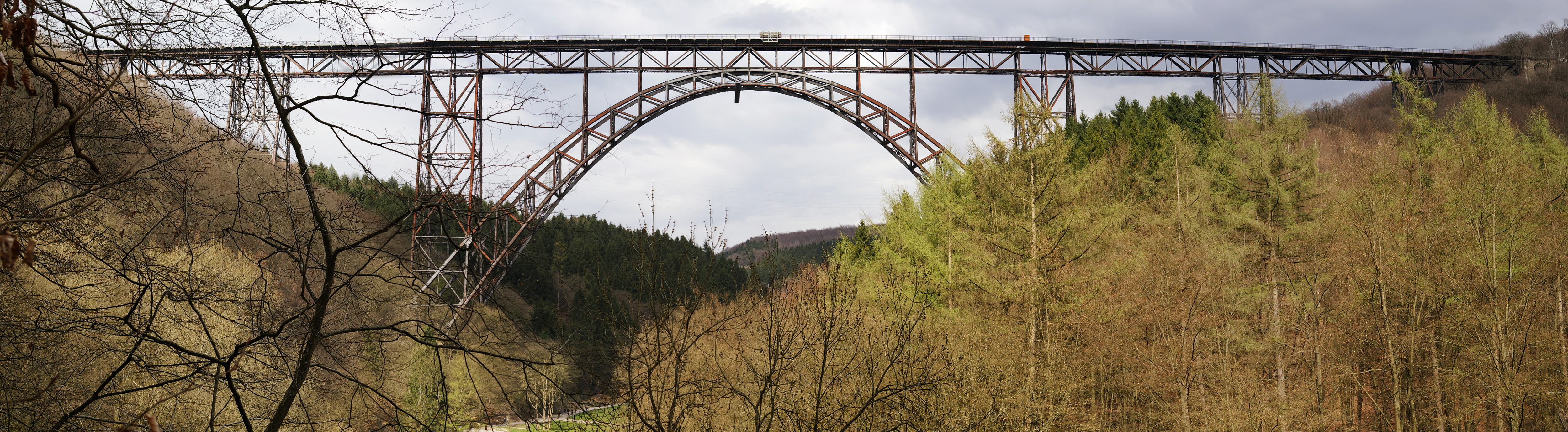 Müngstener Brücke, Panorama von Süden, leider mit Stitching-Fehler, den ich mit autostitch nicht wegbekomme